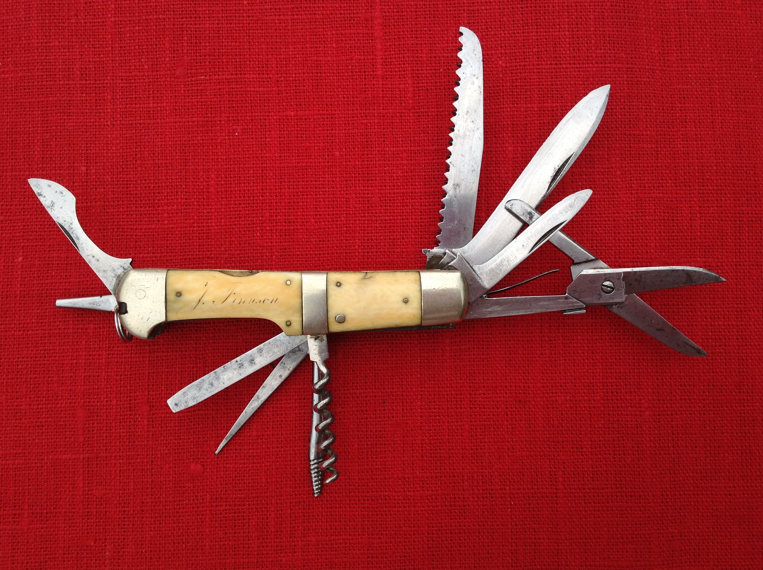 Instrumentkniv med skaft av elfenben. Tillverkare C.O. Ryd.